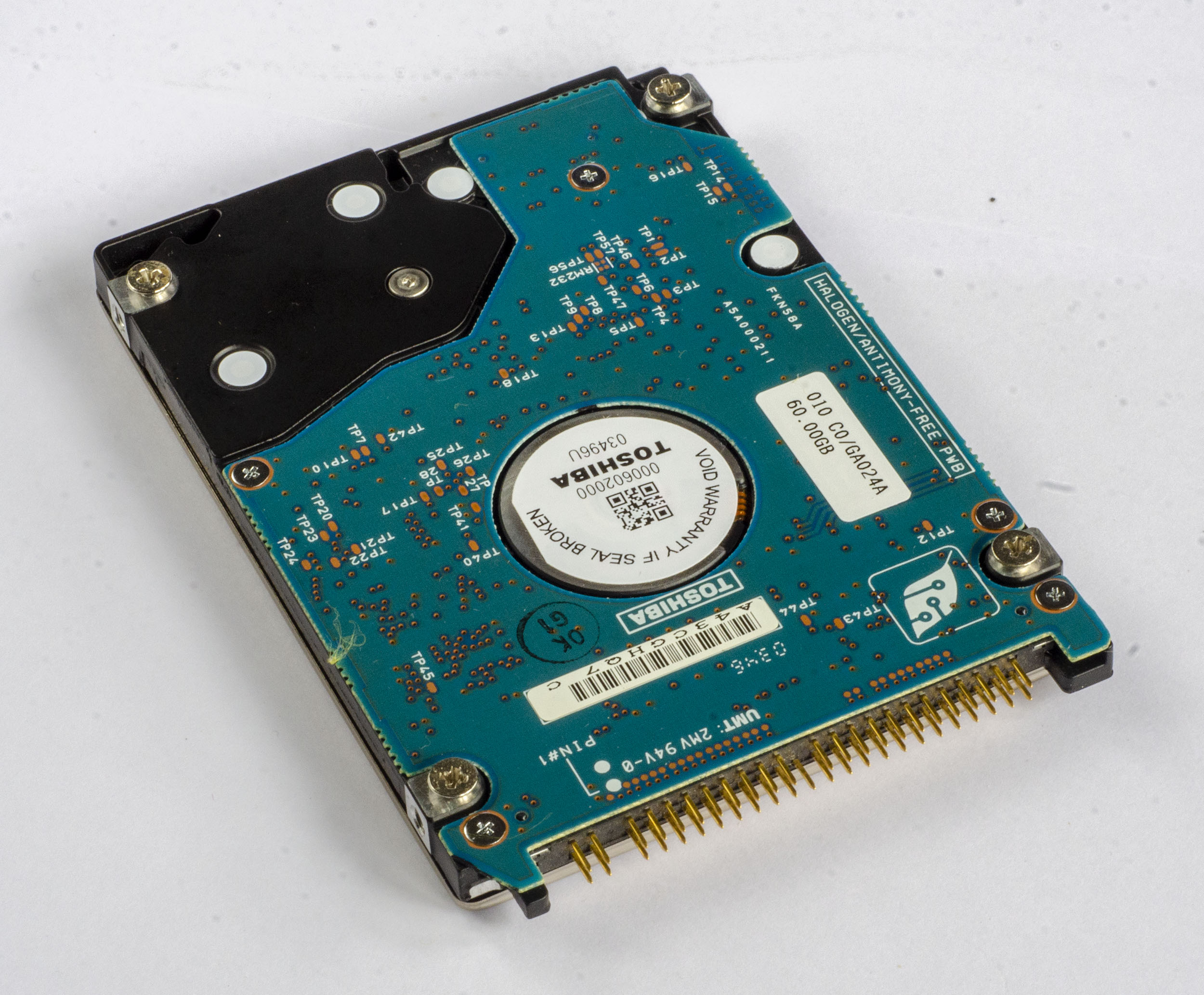 Disco duro interno de 60 GB, vista inferior